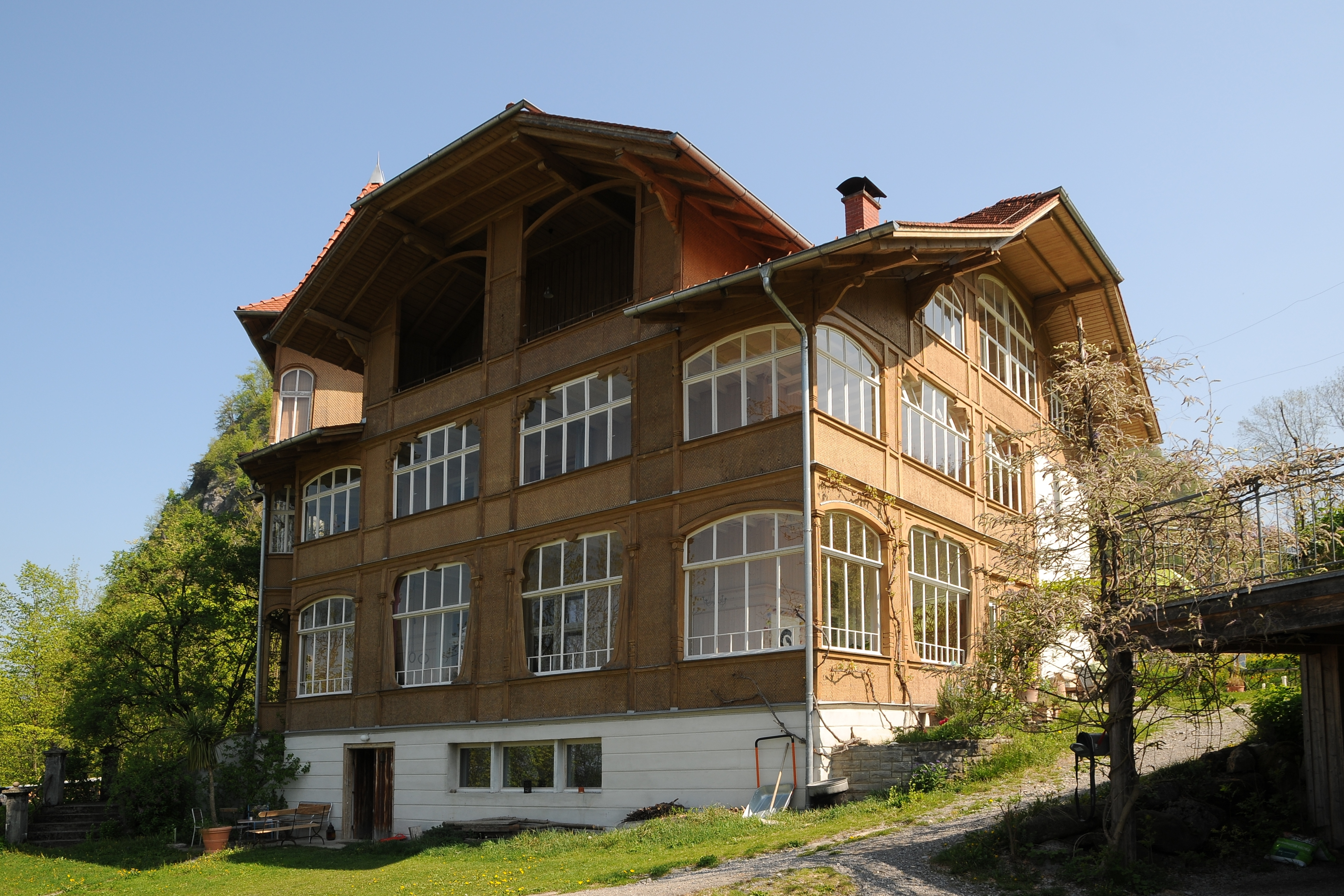 (ehemals Hotel Einfirst) Sägerstraße Nr.18 in Hohenems; Info Dieses Objekt steht unter Denkmalschutz.